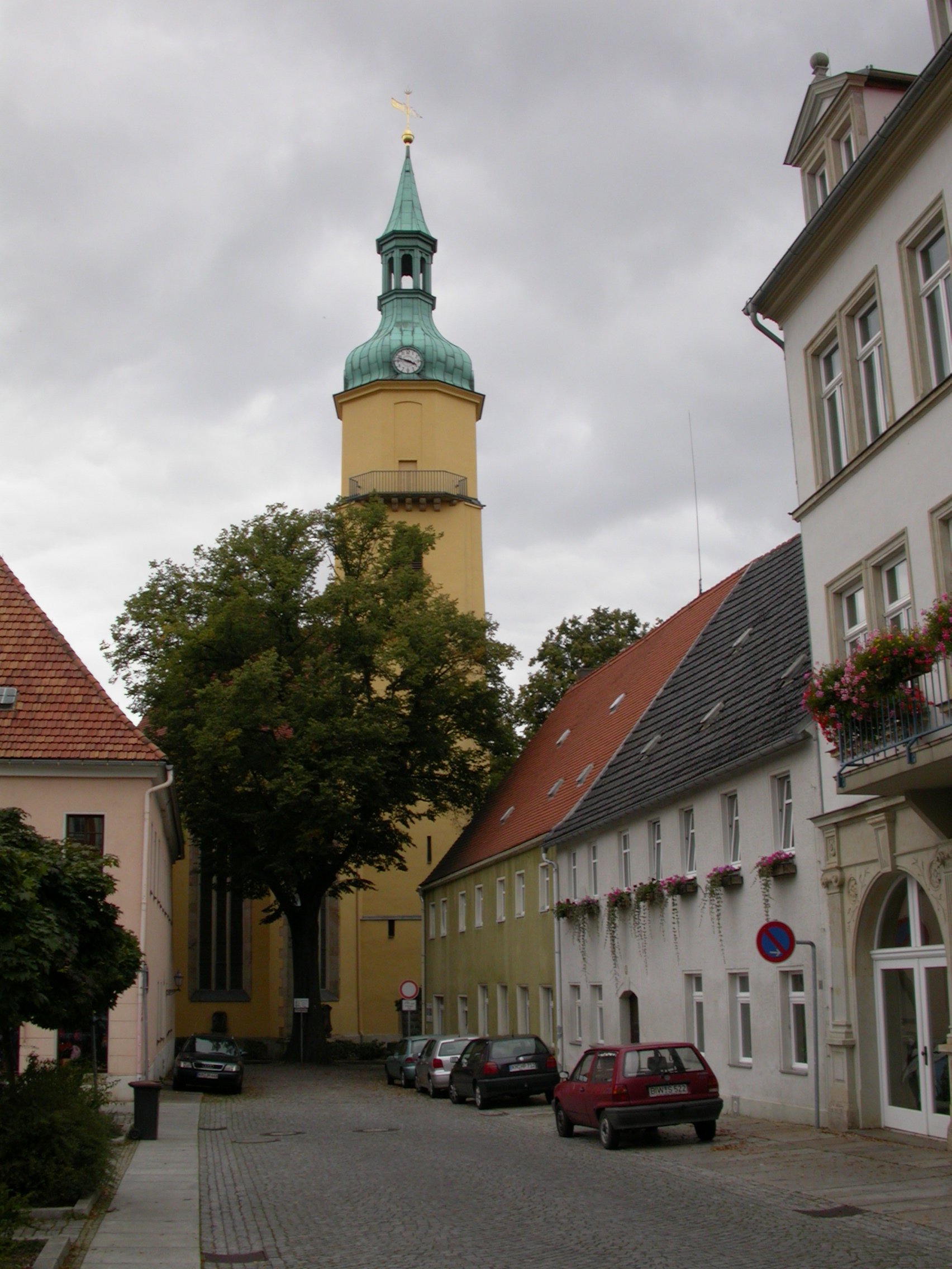 Nicolaikirche in Pulsnitz